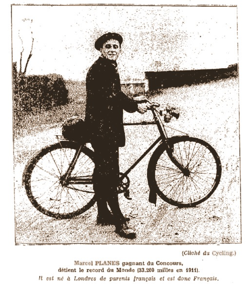 Marcel Planes vainqueur du premier Recordman du monde d'endurance cycliste sur une année civile